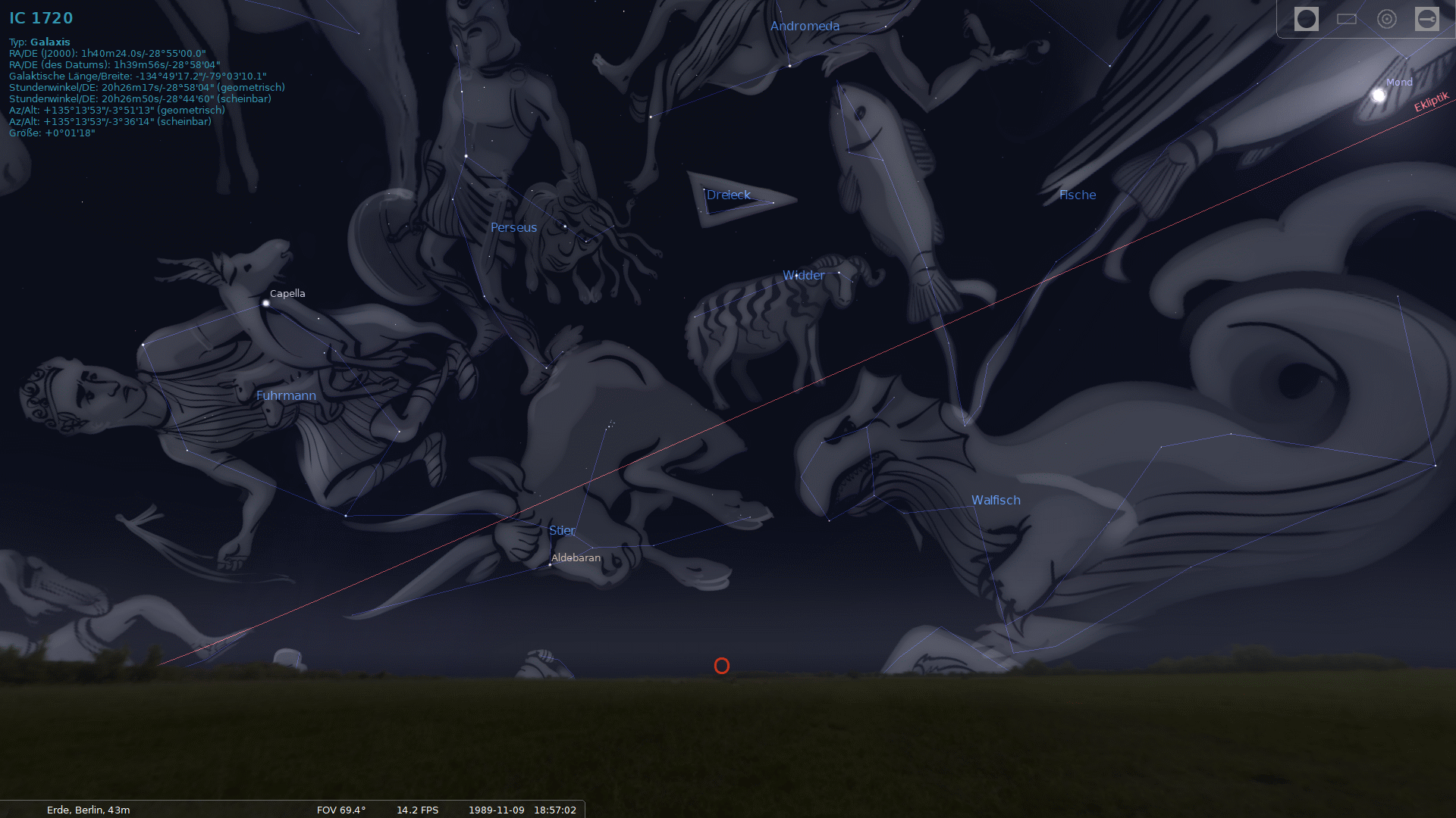 Ausschnitt der Ekliptik-Sternbilder am 9. November 1989, Blickrichtung Osten.